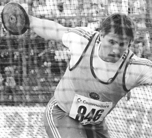 Factual corrections and alternative descriptions are encouraged separately from the original description. Additionally errors can be reported at this page to inform the Bundesarchiv. Original historic description: Jürgen Schult ADN-ZB Sindermann 26.6.88 Rostock: 39. DDR-Meisterschaft in der Leichtathletik- Zum sechsten Mal in Folge wurde Weltmeister Jürgen Schult vom SC Traktor Schwerin DDR-Meister im Diskuswerfen der Herren. Seine höchste Tagesweite betrug 66,92 Meter.